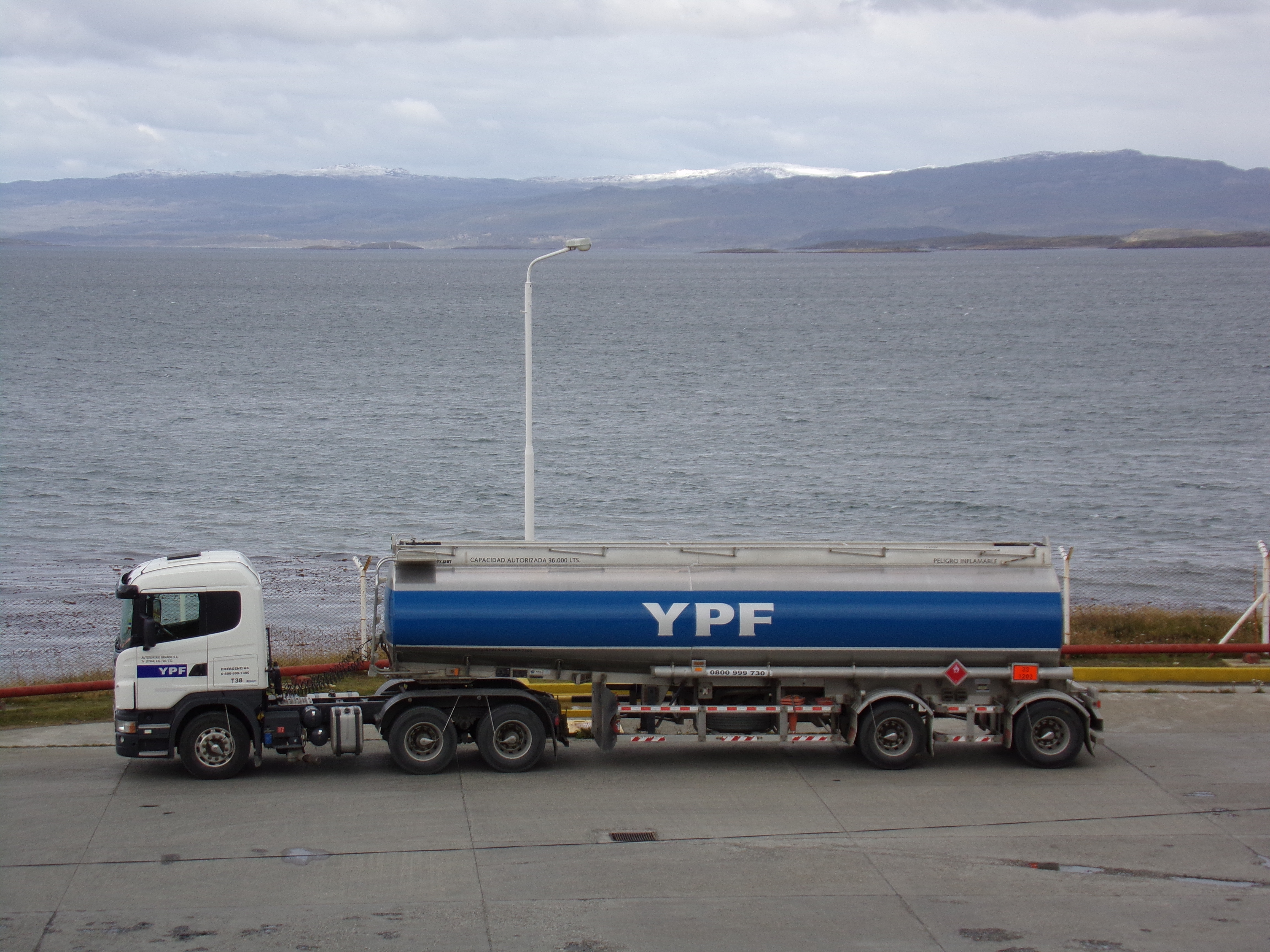 Instalaciones de YPF en Ushuaia, Tierra del Fuego